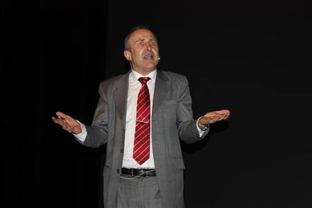 Hier können sie Herrn Gerhard Ruby beim halten eines Vortages sehen.